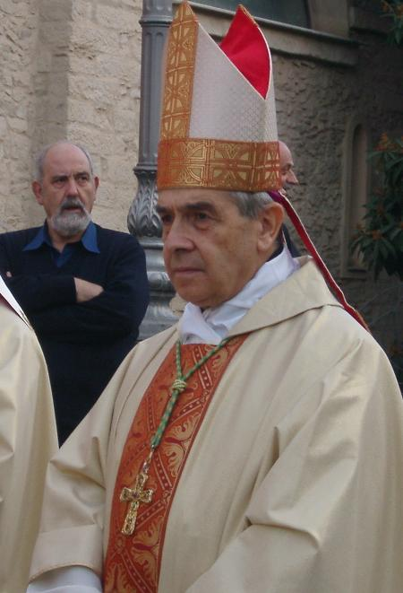 Mons. Pier Giuliano Tiddia, Arcivescovo Emerito di Oristano